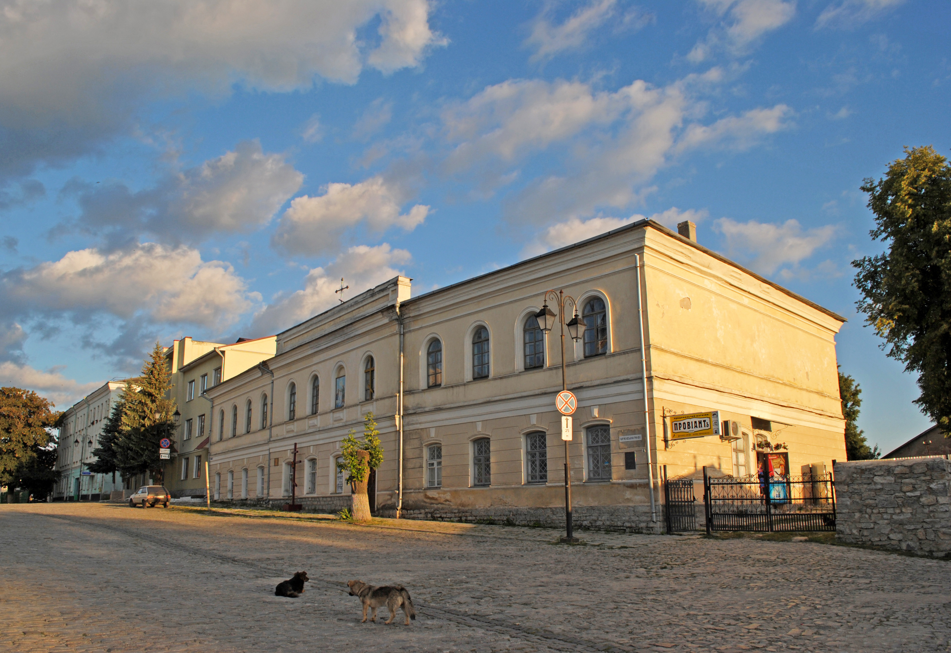 Консисторiя духовна, Кам'янець-Подільський, Вiрменський ринок, 4